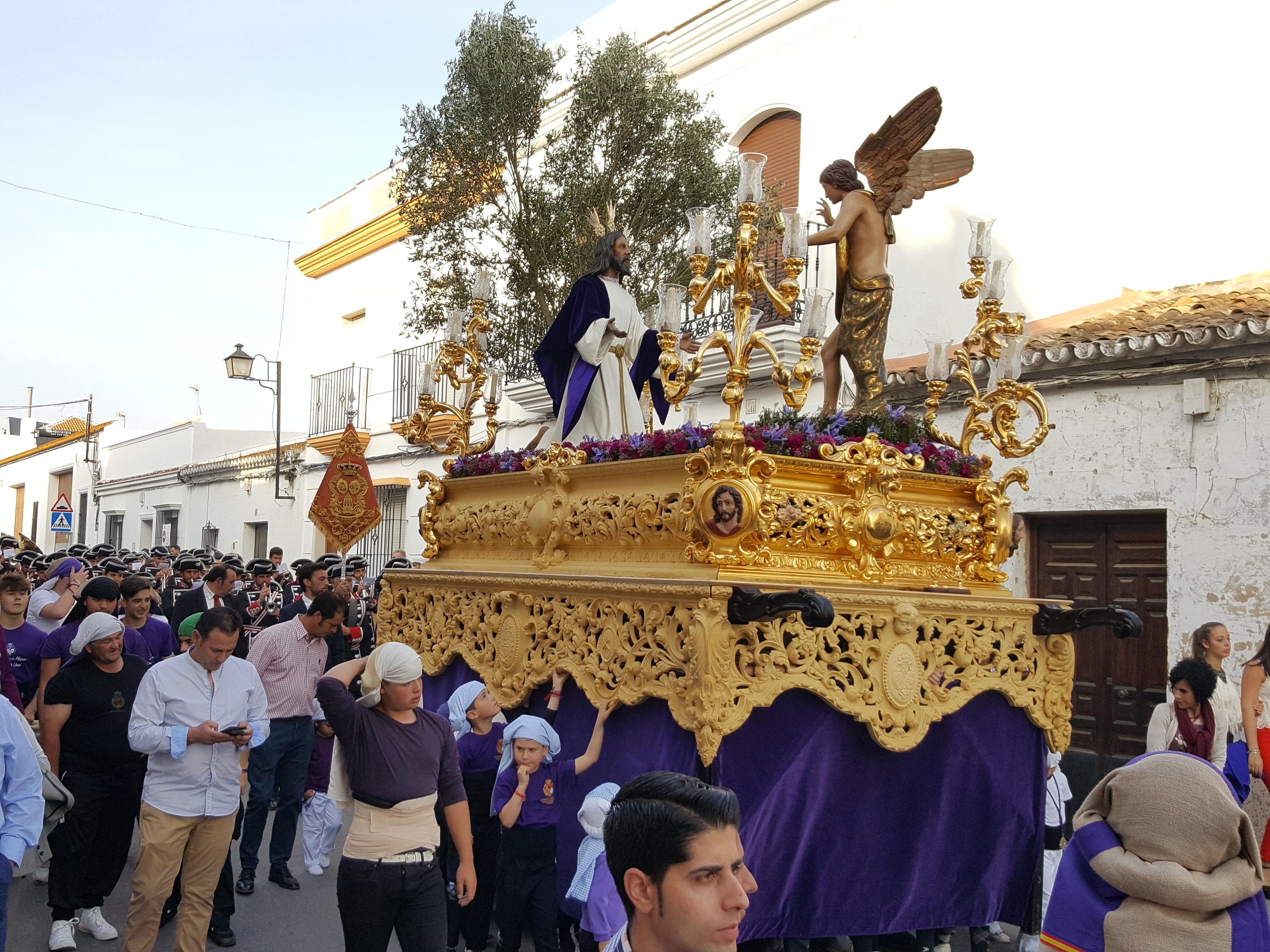 Hermandad de la Oración del Huerto. Desfile procesional del Jueves Santo. Vista de paso de la Oración del Huerto por el casco urbano de Moguer.